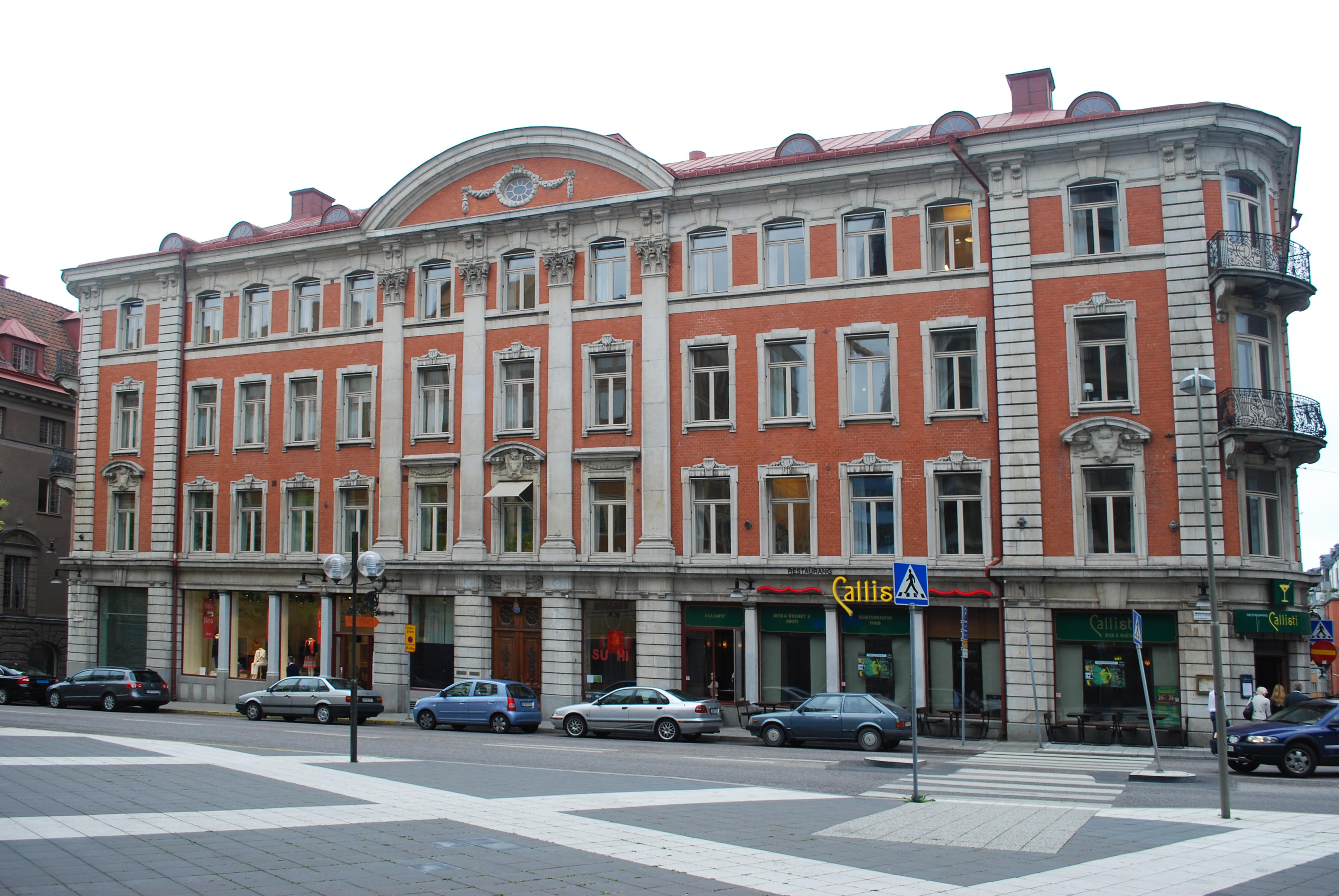 Brunkhalsen 5, Malmtorgsgatan 5 Stockholm. Nybyggnadsår 1897 - 1899 Alb. Andersson (Byggmästare) Erik Josephson (Arkitekt) Lifförsäkrings AB Nordstjernan (Byggherre)